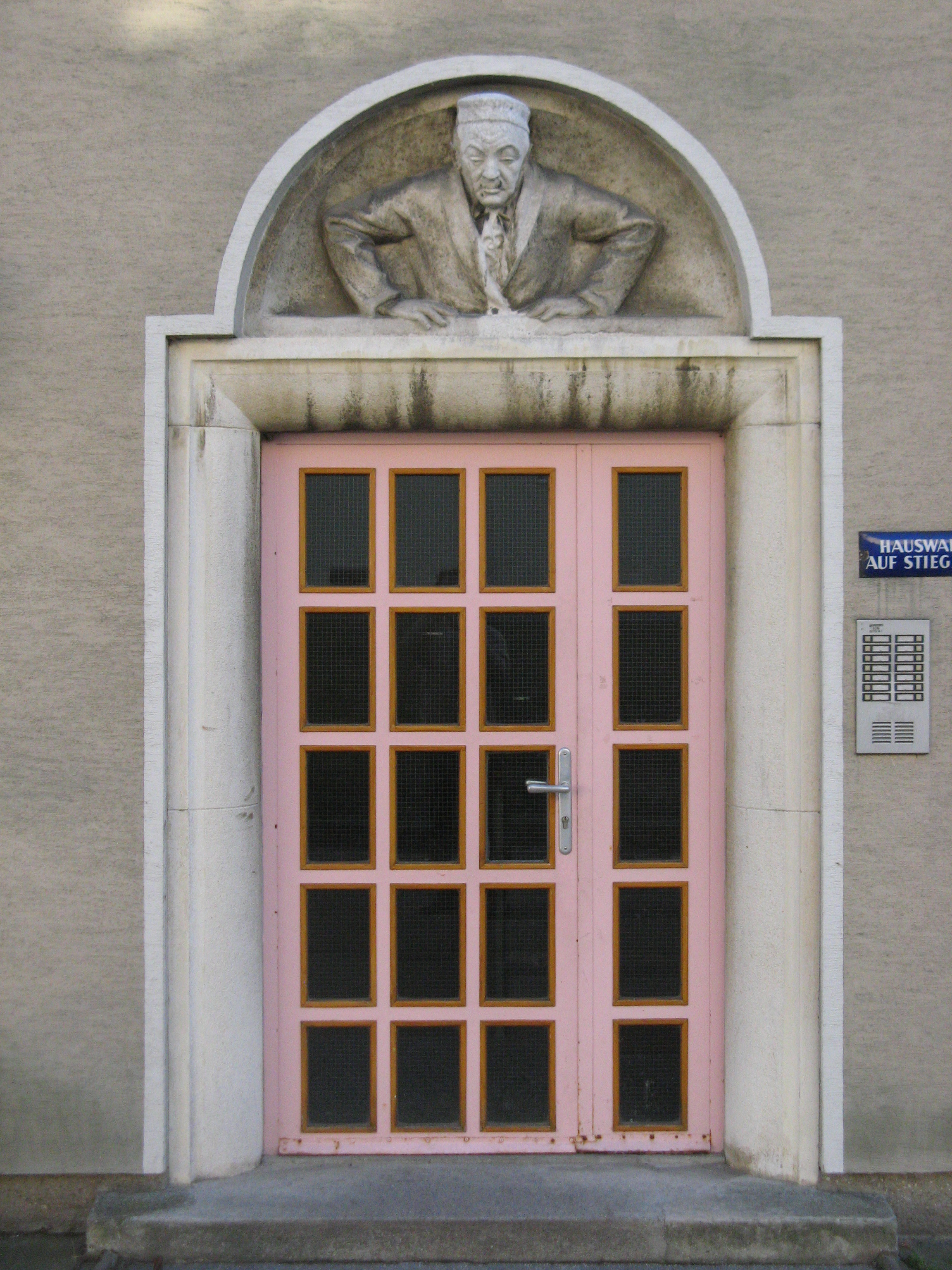 Fenstergucker (1953/54) von Josef Bock, Laxenburger Straße 203-207, Wien-Favoriten